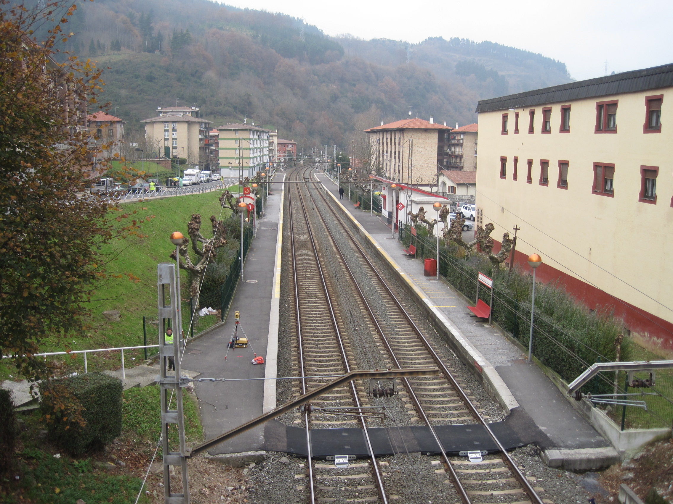 Vista de la estación